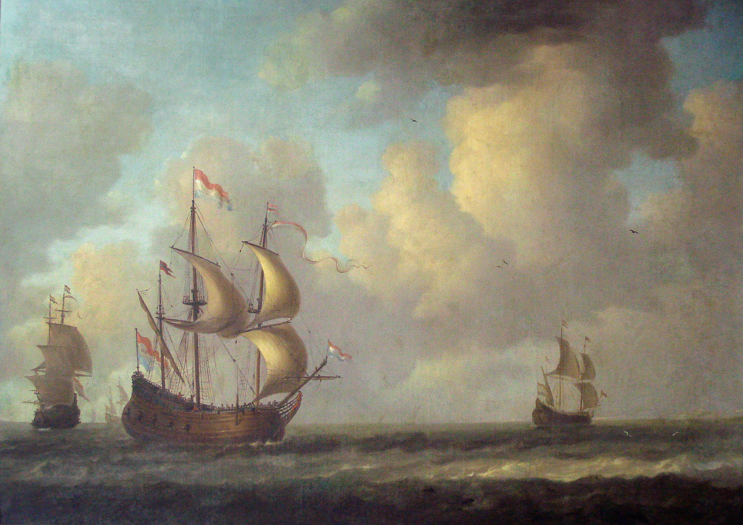 O Rejalma